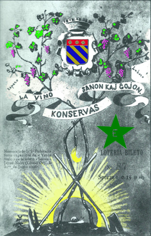 Billet de loterie 1908